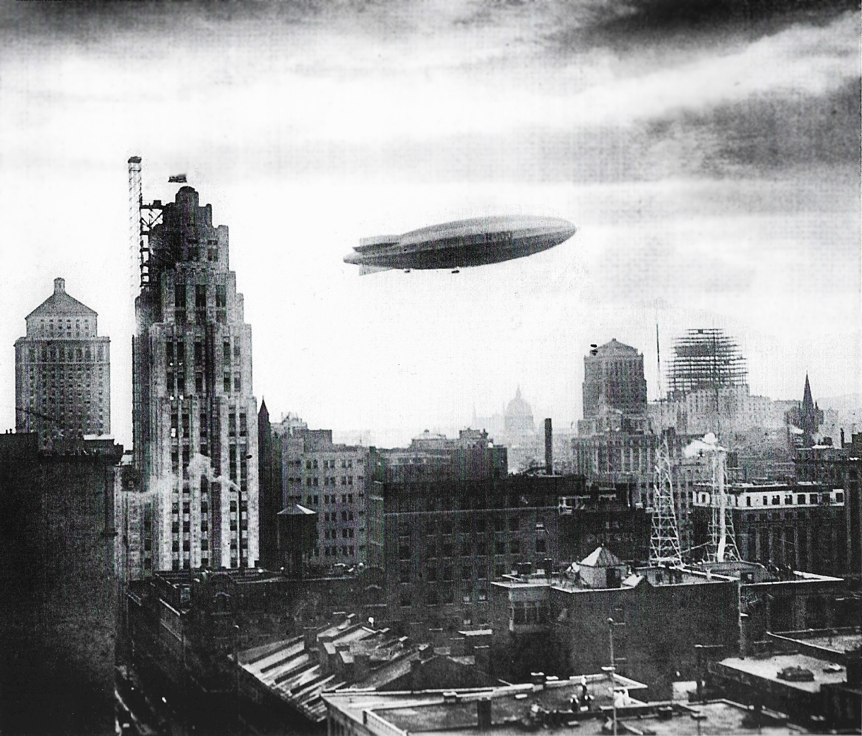 La visite du dirigeable R-100 à Montréal À gauche : la tour de la Banque Royale et l'édifice Aldred avec des échafaudages À droite : l'édifice de Bell et celui de la Sun Life en construction La photo a peut-être été prise depuis l'édifice de La Sauvegarde, à l'est.